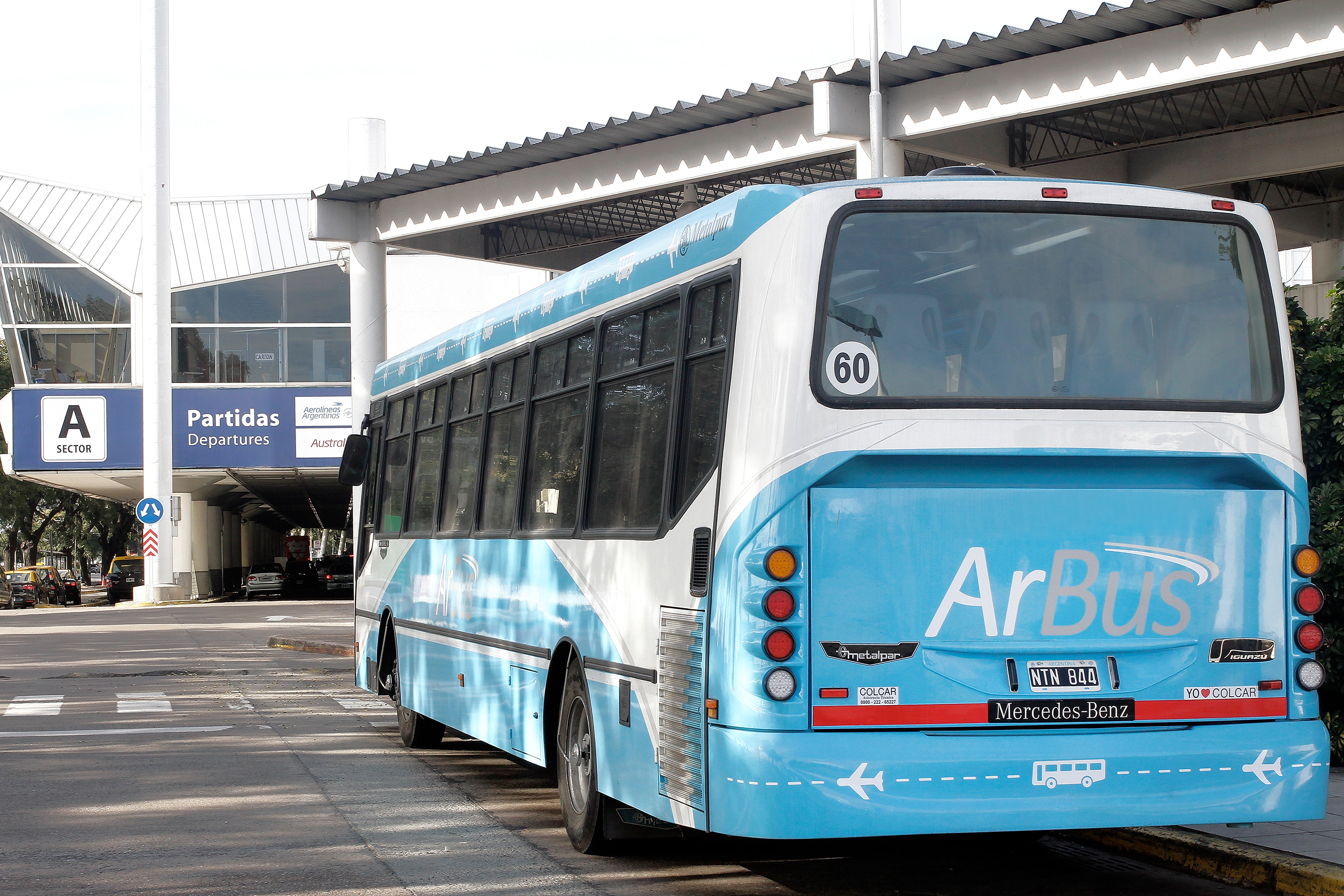 ArBus - Servicio de trransporte tterrestre para pasajeros y empleados del Aeroparque Jorge Newbery